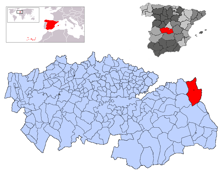 Santa Cruz de la Zarza en la provincia de Toledo